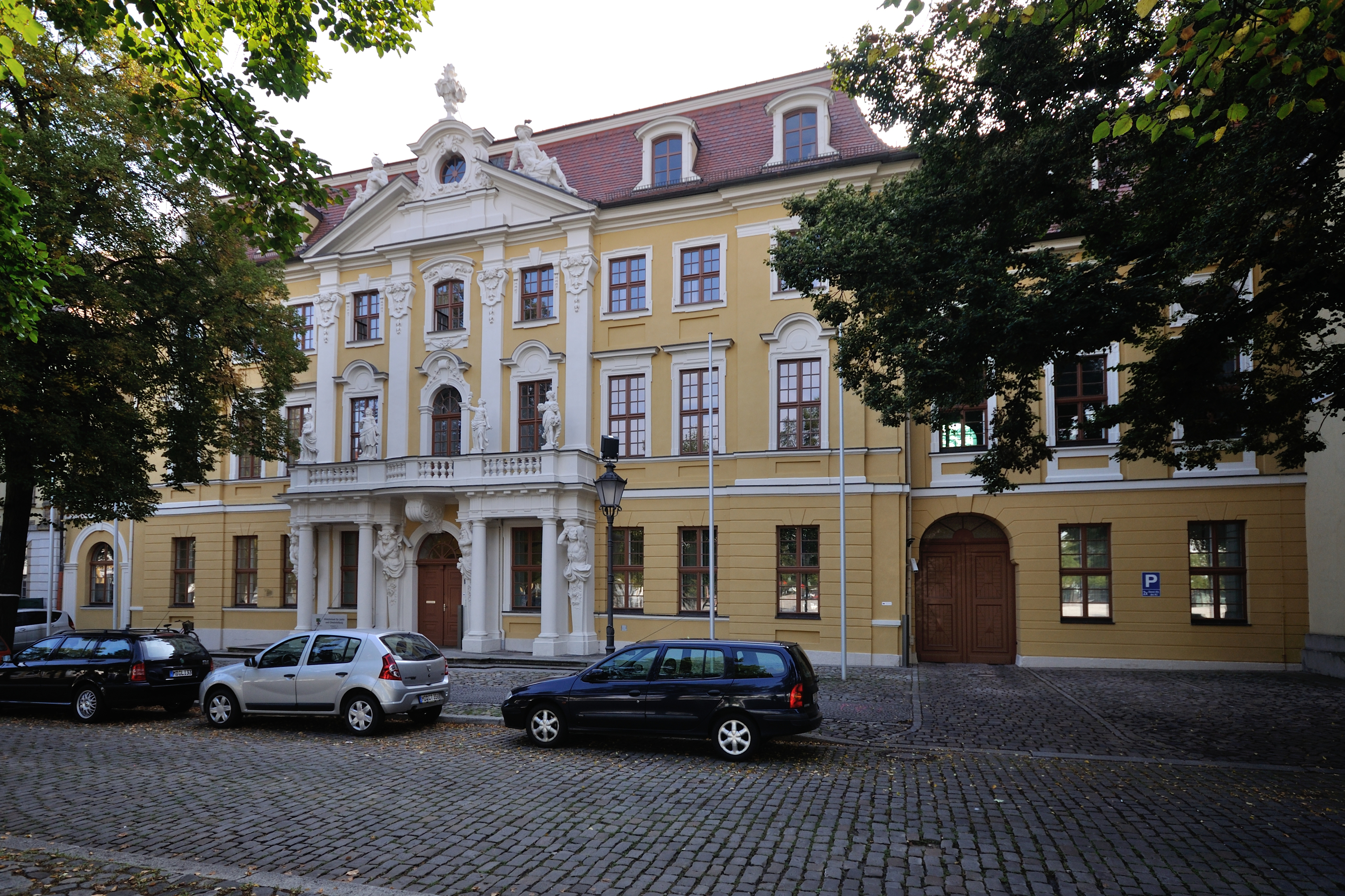 Domplatz 4 in Magdeburg-Altstadt. This is a photograph of an architectural monument.It is on the list of cultural monuments of Magdeburg